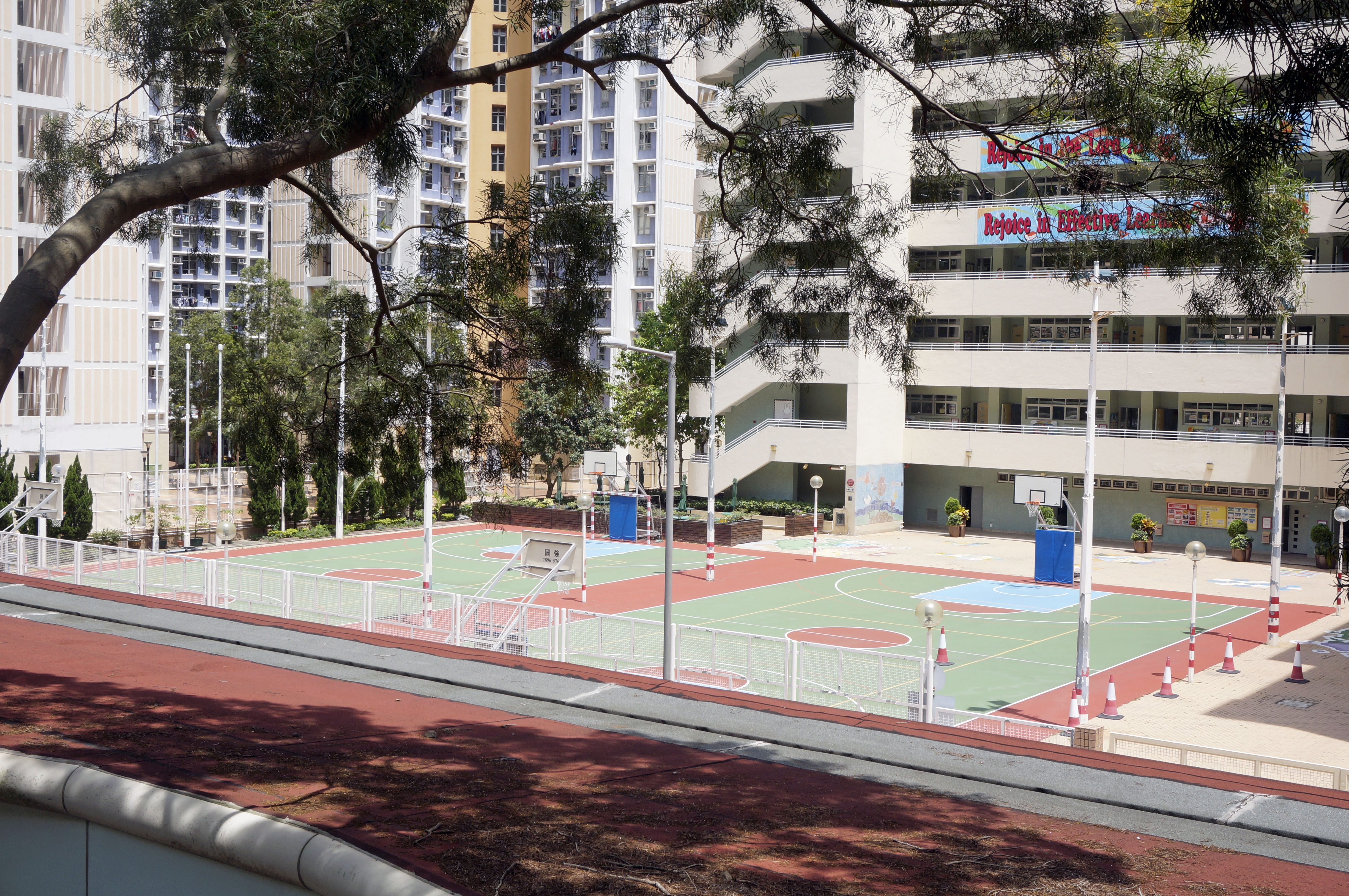 港澳信義會明道小學調景嶺校舍的球場